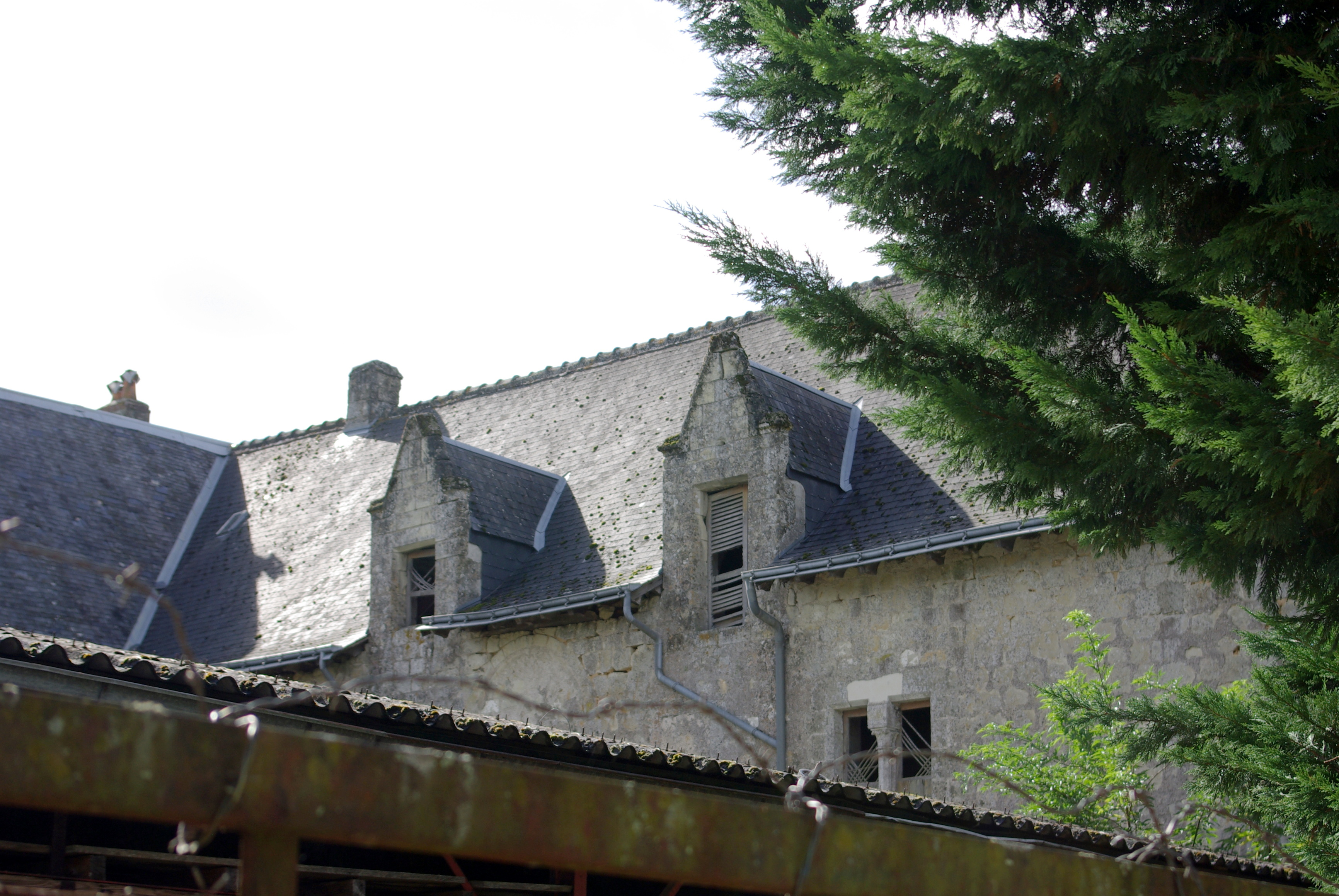 Logis seigneurial de Parçay.